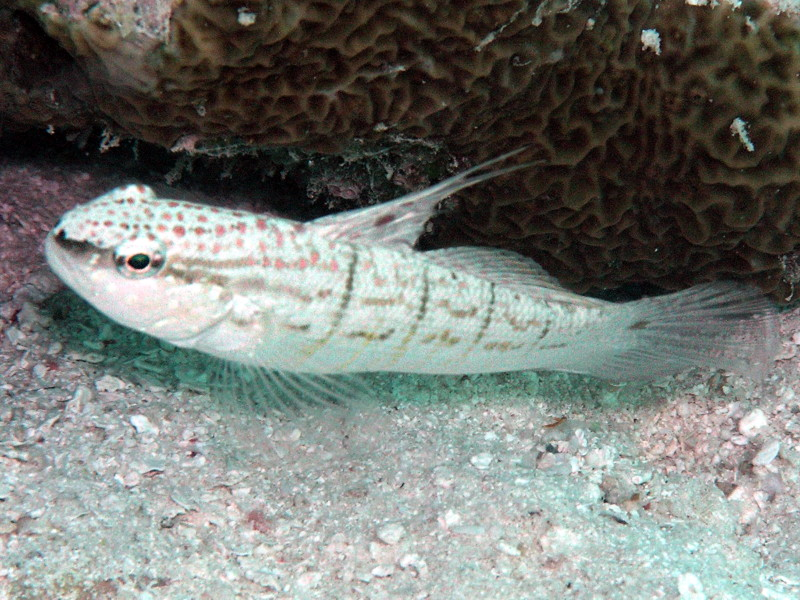 Grundel, Amblyogobius semicinctus, Malediven, Veligandu, Dezember 2004, Kamera: Olympus C-765